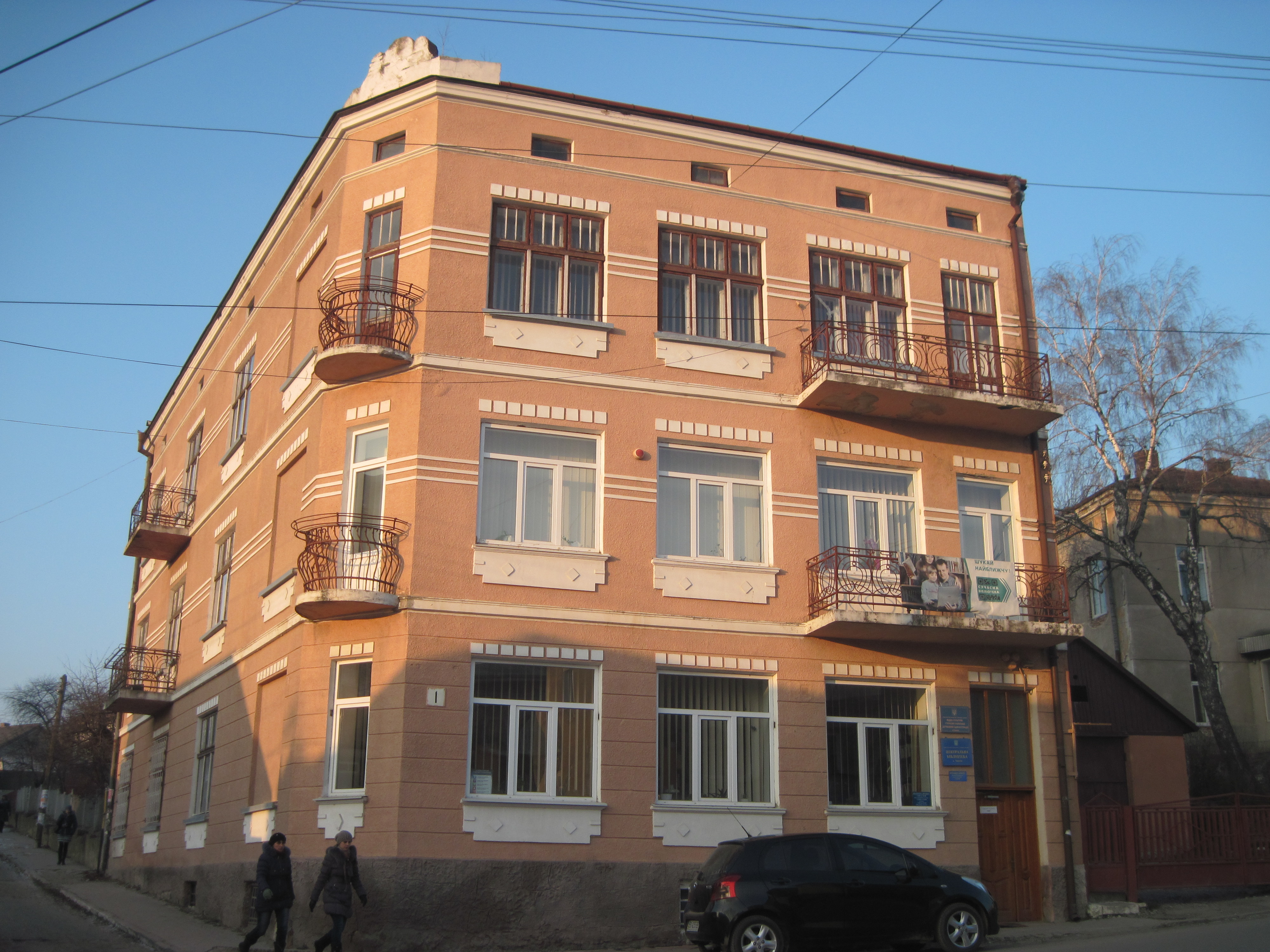 Чортків, бібліотека